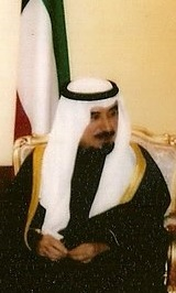 عميد الصحافة ناصر العثمان الفخرو م مع أمير الكويت السابق الشيخ جابر الاحمد الصباح